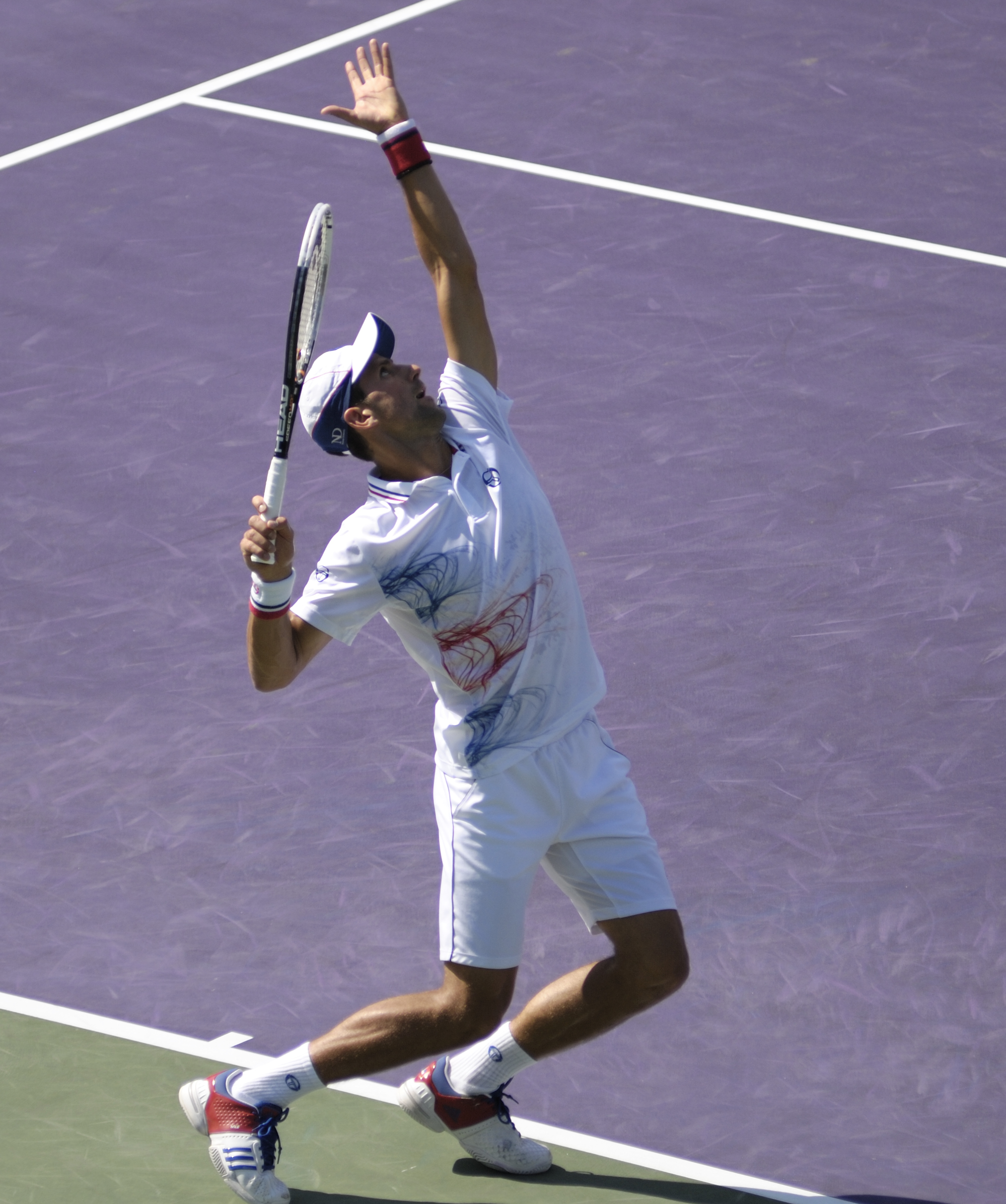 Djoker trophy pose